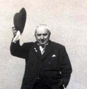 Vincenzo Fagiuoli